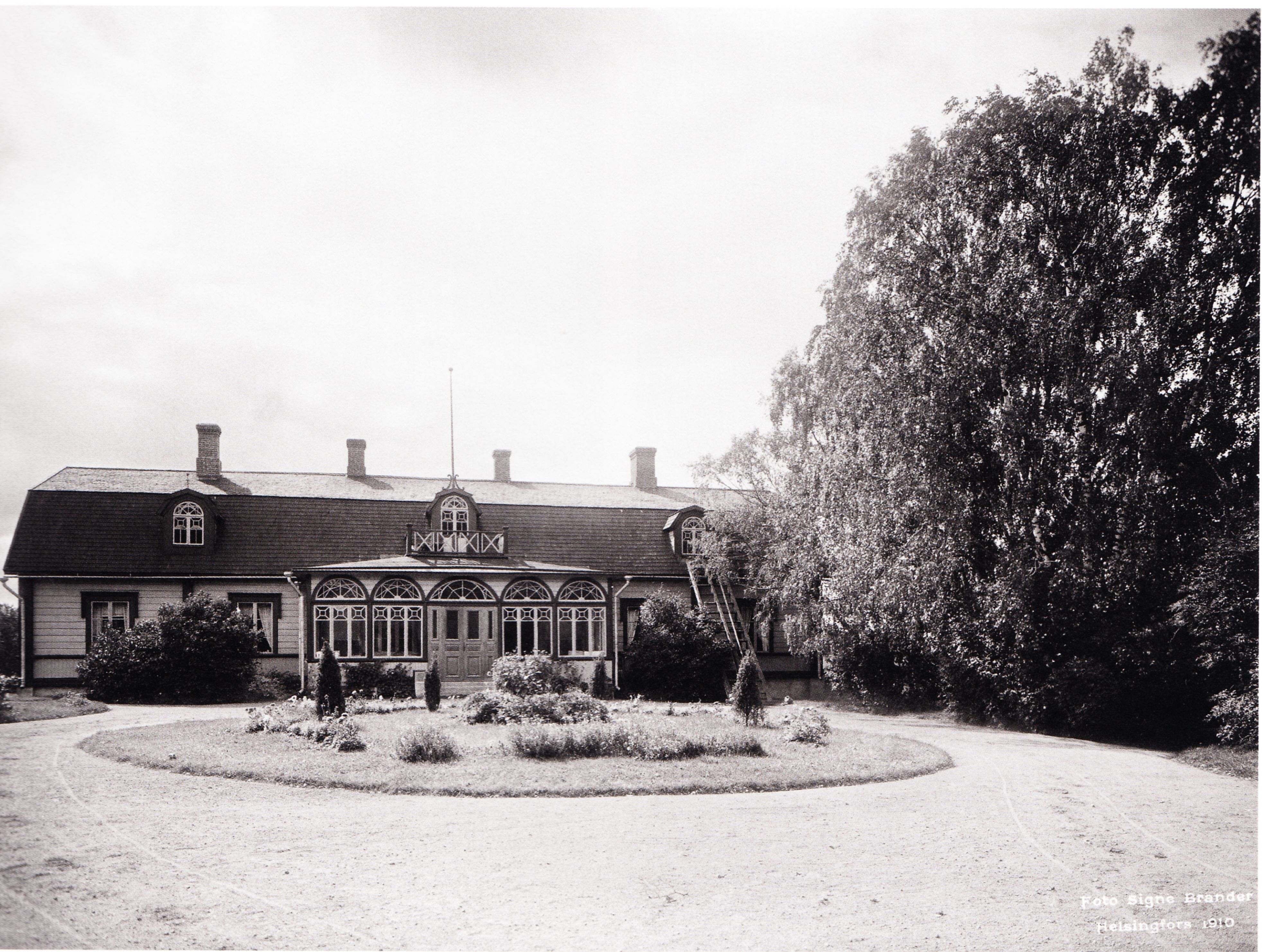 Jakkarilan kartano porvoossa vuonna 1910